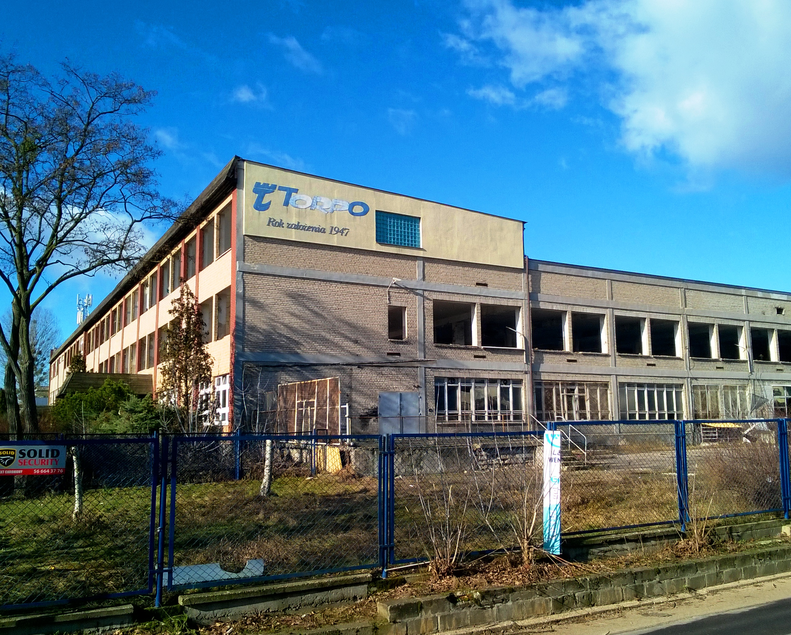 Torpo w Toruniu2019